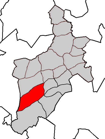 Situación da parroquia de Folgoso no concello de Abegondo